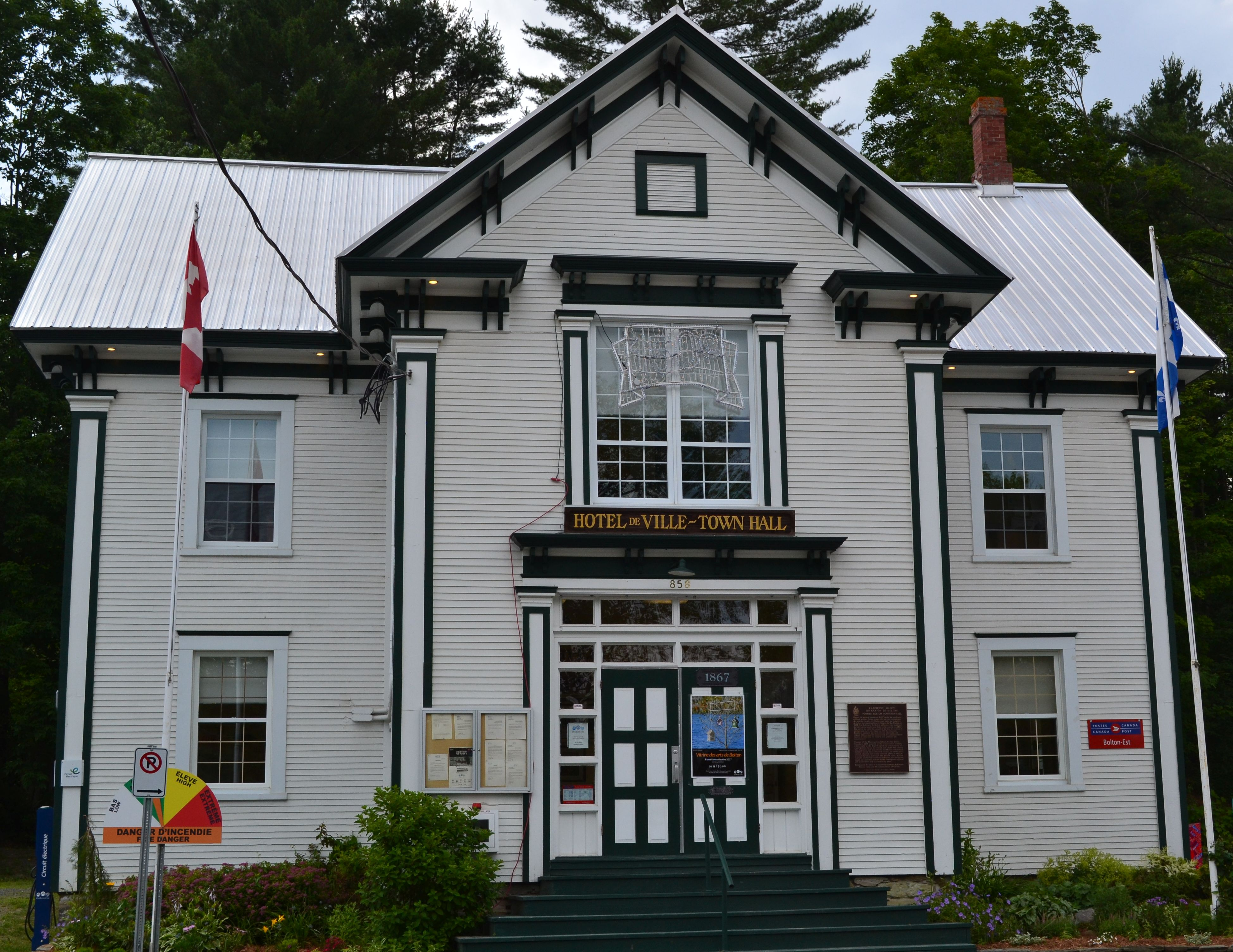 Face avant de la mairie du canton de Bolton-Est, Québec.